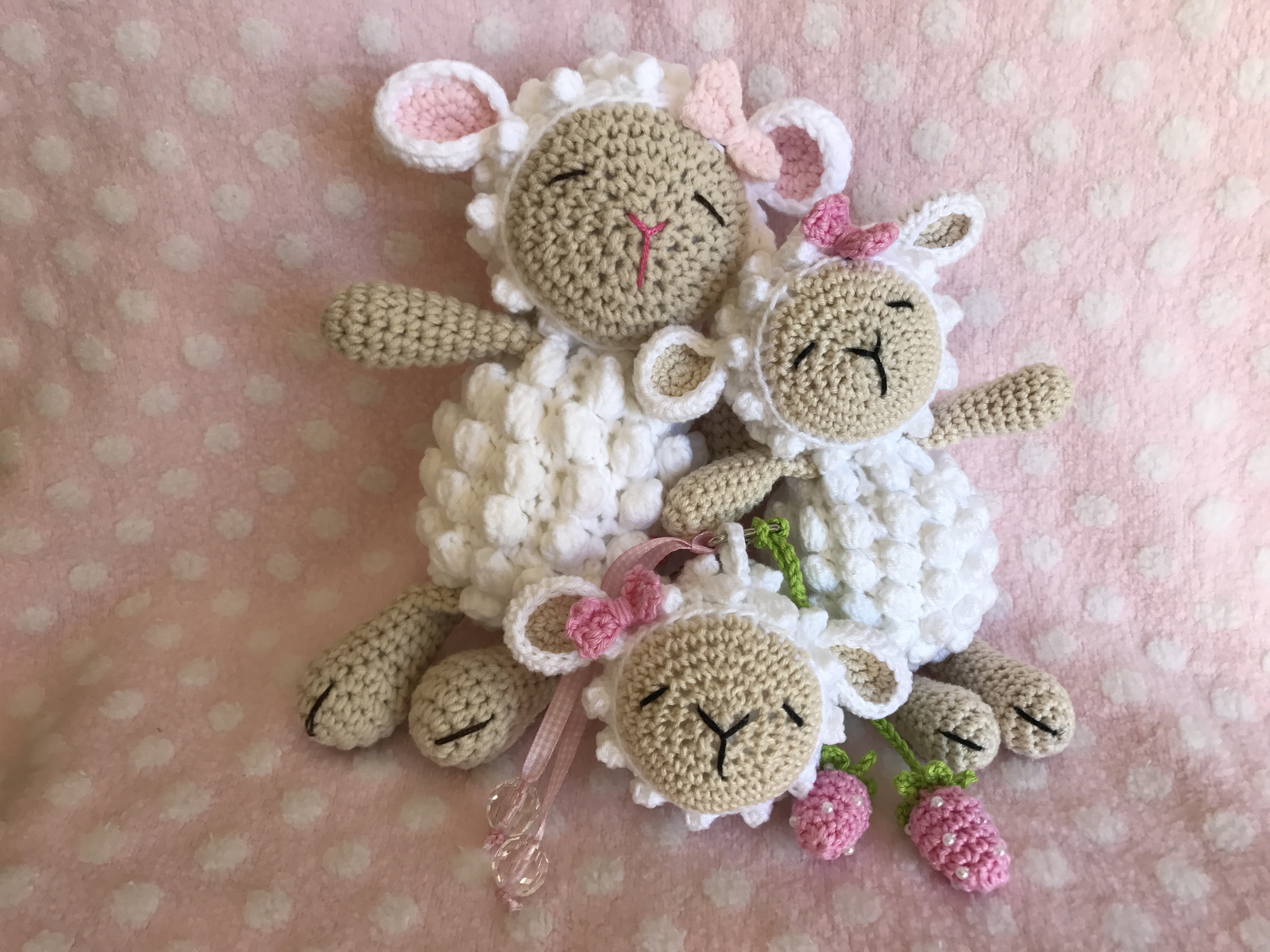 O workshop gratuito de amigurumi da "Ovelhinha Pipoca" foi desenvolvido para mostrar o uso do ponto pipoca em Amigurumis.